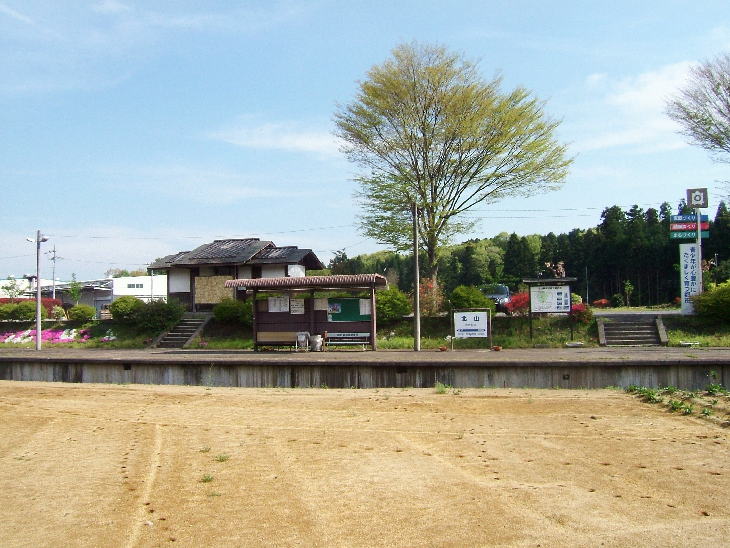 Moka-railway Kitayama Station